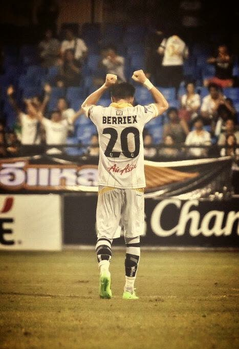 Foto 02